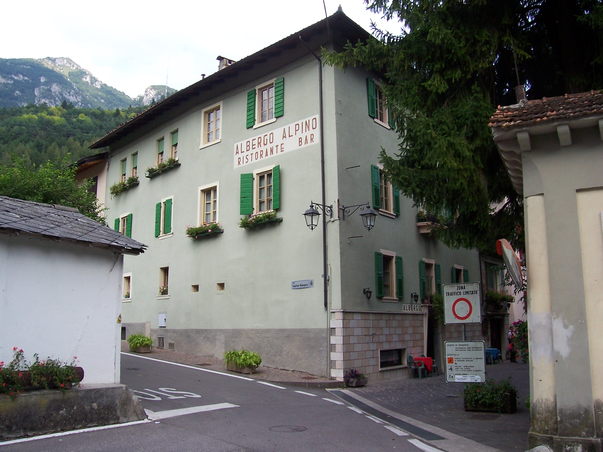 Pieve di Ledro, Albero Alpino, dove cadde in combattimento il tenente Giulio Grossi durante la battaglia di Pieve di Ledro, episodio della terza guerra di indipendenza italiana.